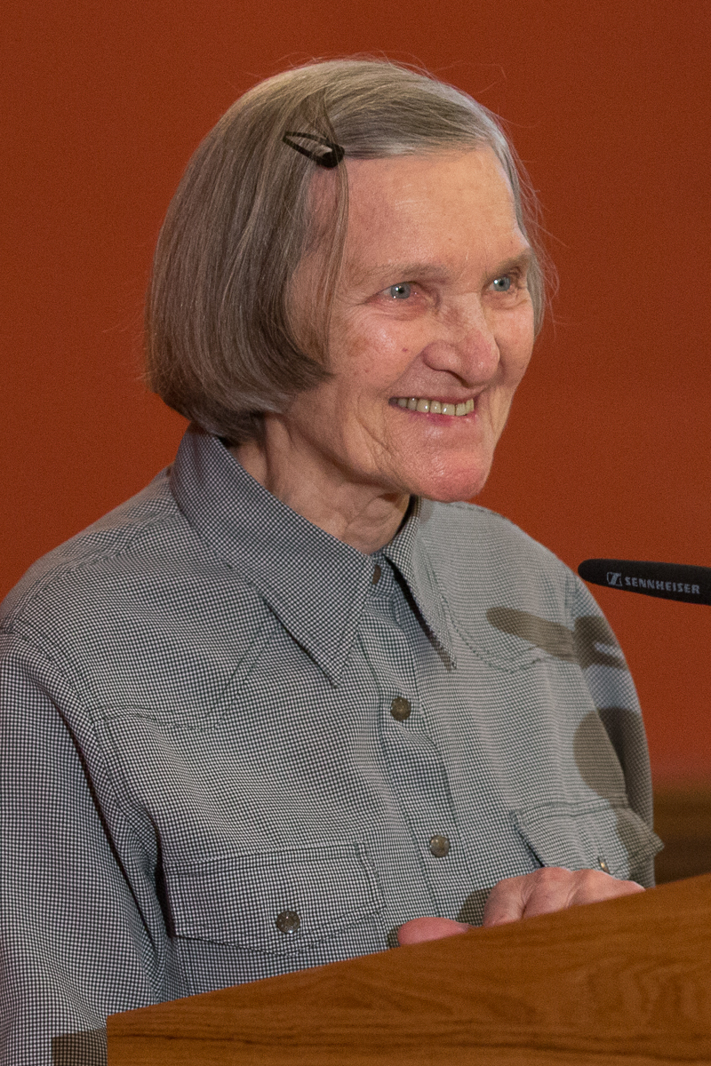 2015.gada 24.aprīlis. Konference “40 gadi kopš Helsinku vienošanās. Ko tālāk?”. Foto: Ernests Dinka, Saeimas Kanceleja Izmantošanas noteikumi: saeima.lv/lv/autortiesibas